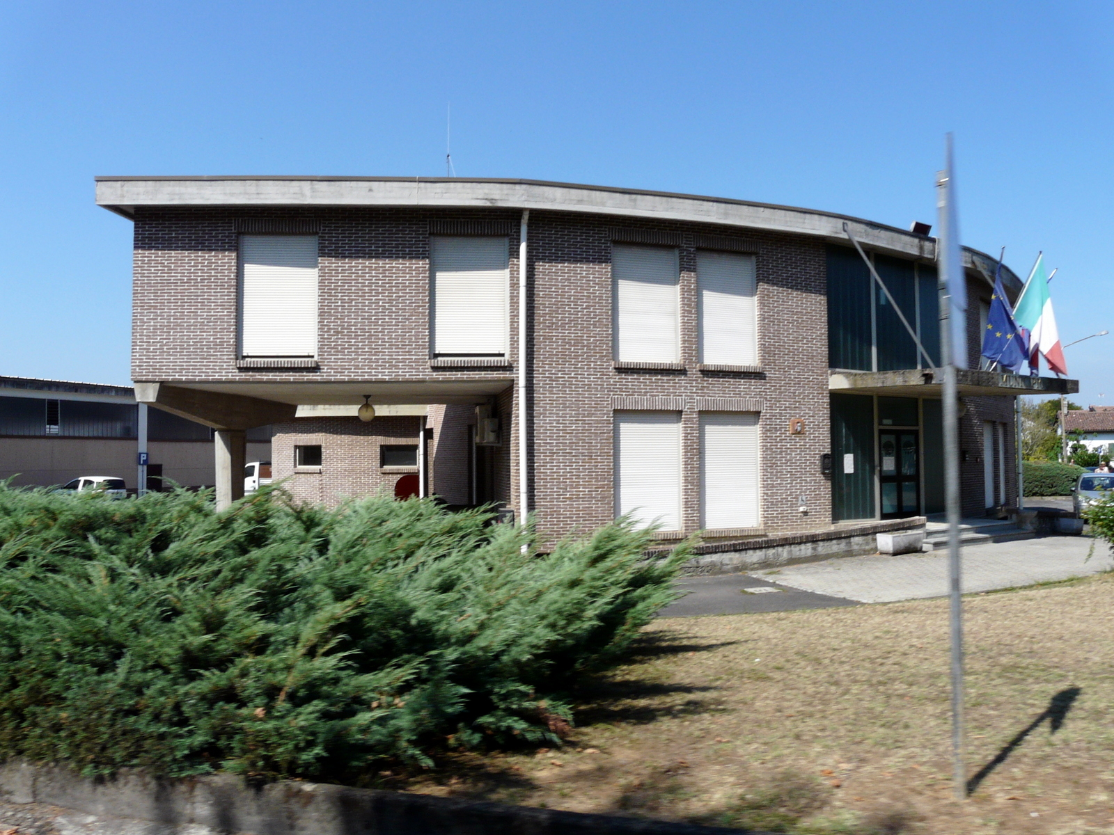 Municipio di Basaluzzo, Piemonte, Italia